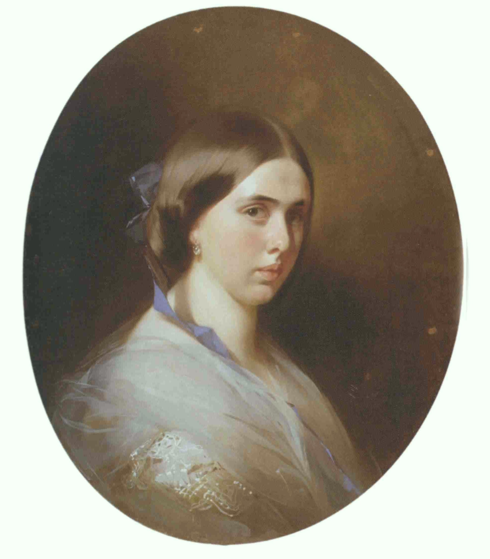 И. Макаров. Портрет Н.В. Долгорукой. Холст, масло, 1850-е. Дальневосточный художественный музей. Экспонируется в Дальневосточном художественном музее как работа А.Т. Маркова, однако на персональной выставке И. Макарова в Музее Пушкина (2012) указывается, что это ошибка, и автором является Макаров. Этим же художником выполнен портрет ее сына Николая (см. ниже). До революции портрет княгини находился в родовом подмосковном имении Волынщина, о чем имеется фотосвидетельство. Наталья Владимировна Долгорукова, ур. Орлова-Давыдова(1833-1885), дочь В.П.Орлова-Давыдова (1810-1882) и О.И.Барятинской (1814-1876), жена Дмитрия Николаевича Долгорукова (1827—1910).